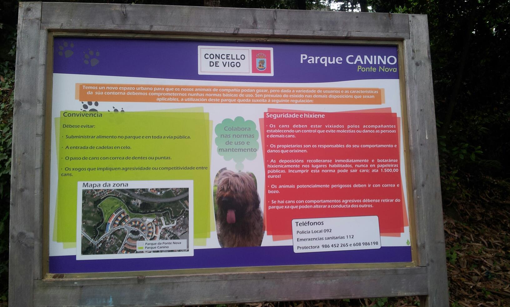 Cartel Nomativo del Parque Canino de Pontenova